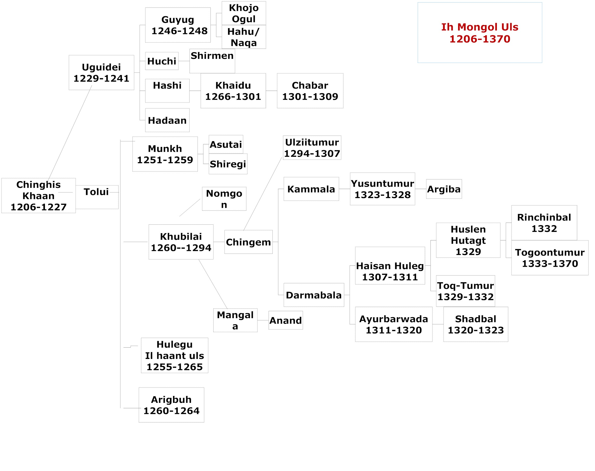 Монгол: Их Монгол Улсын хаад